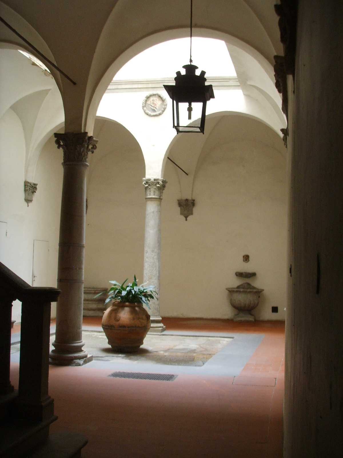 Palazzo corsini-rosselli del turco, cortile